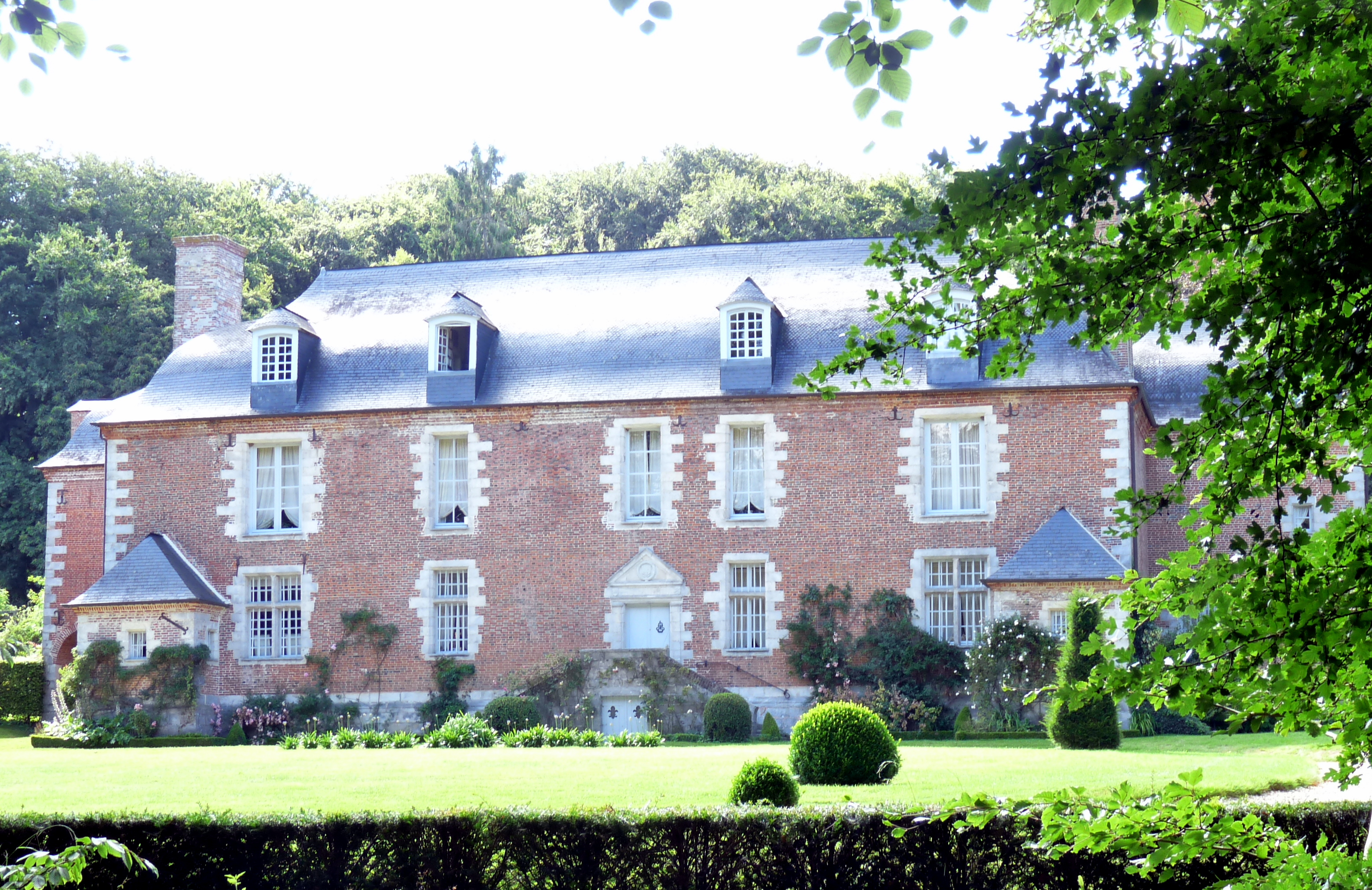 Château d'Herbouville, à Saint-Pierre-le-Vieux, en Seine-Maritime (France) .